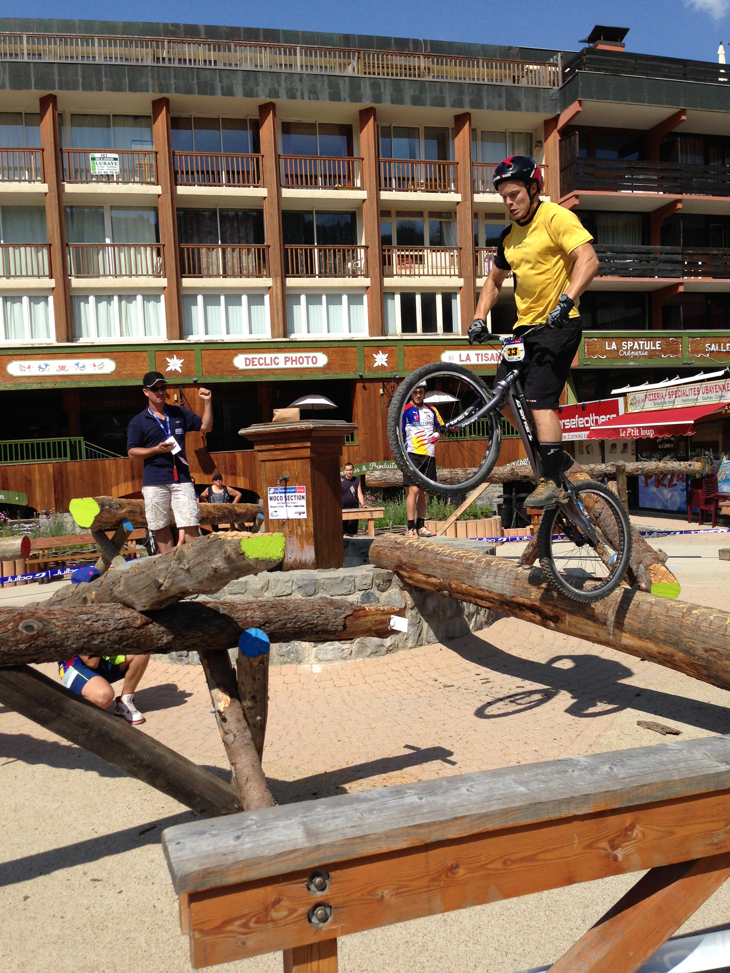 Eirik Ulltang sykler i en seksjon under verdenscupen i Pra-Loup, Frankrike.